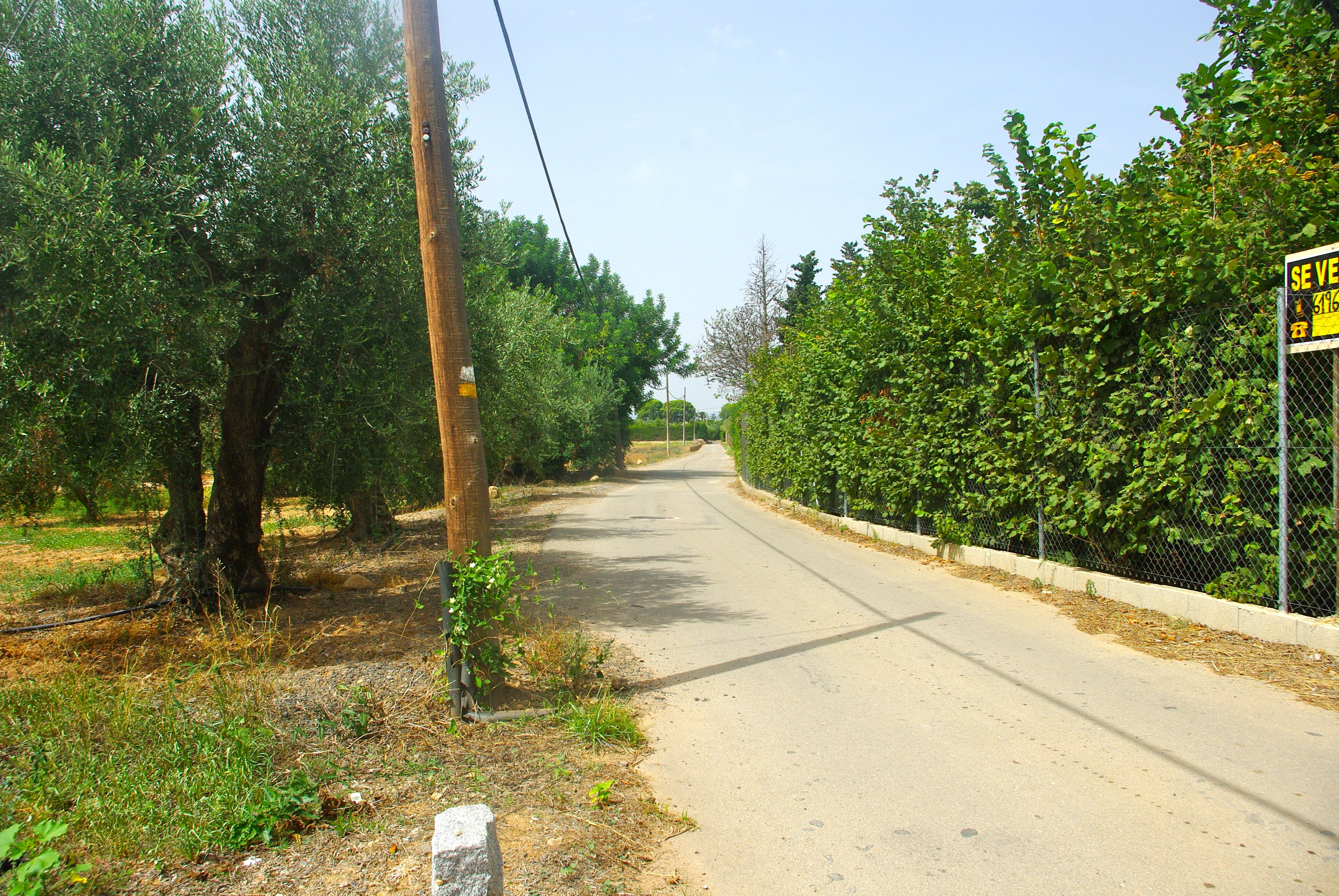 Camí de Rubió, al terme de Reus